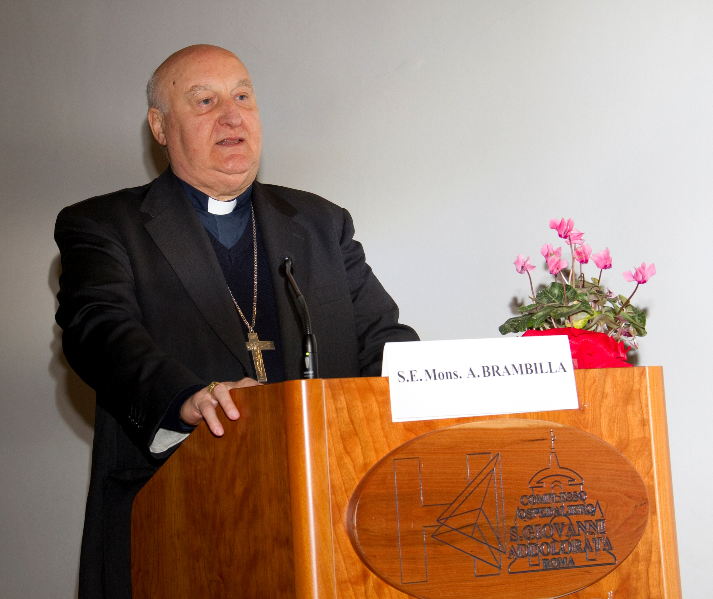 Il vescovo Armando Brambilla, ausiliare di Roma. Foto presa da me durante un convegno, svoltosi a Roma il 9 novembre 2011. Deceduto il 24.XII.2011